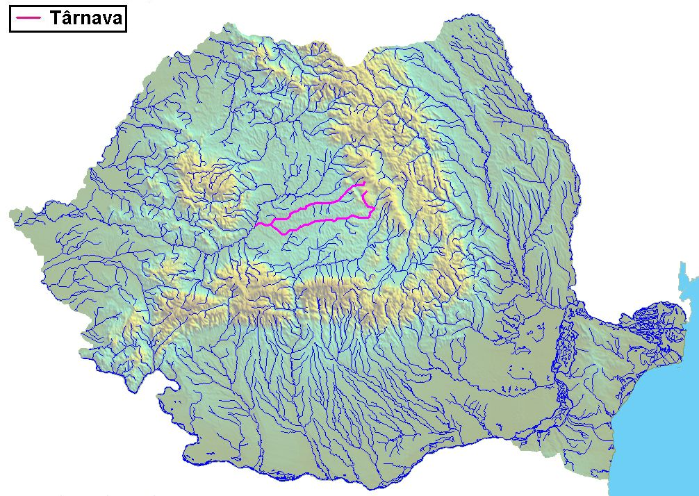 Raul Tarnava